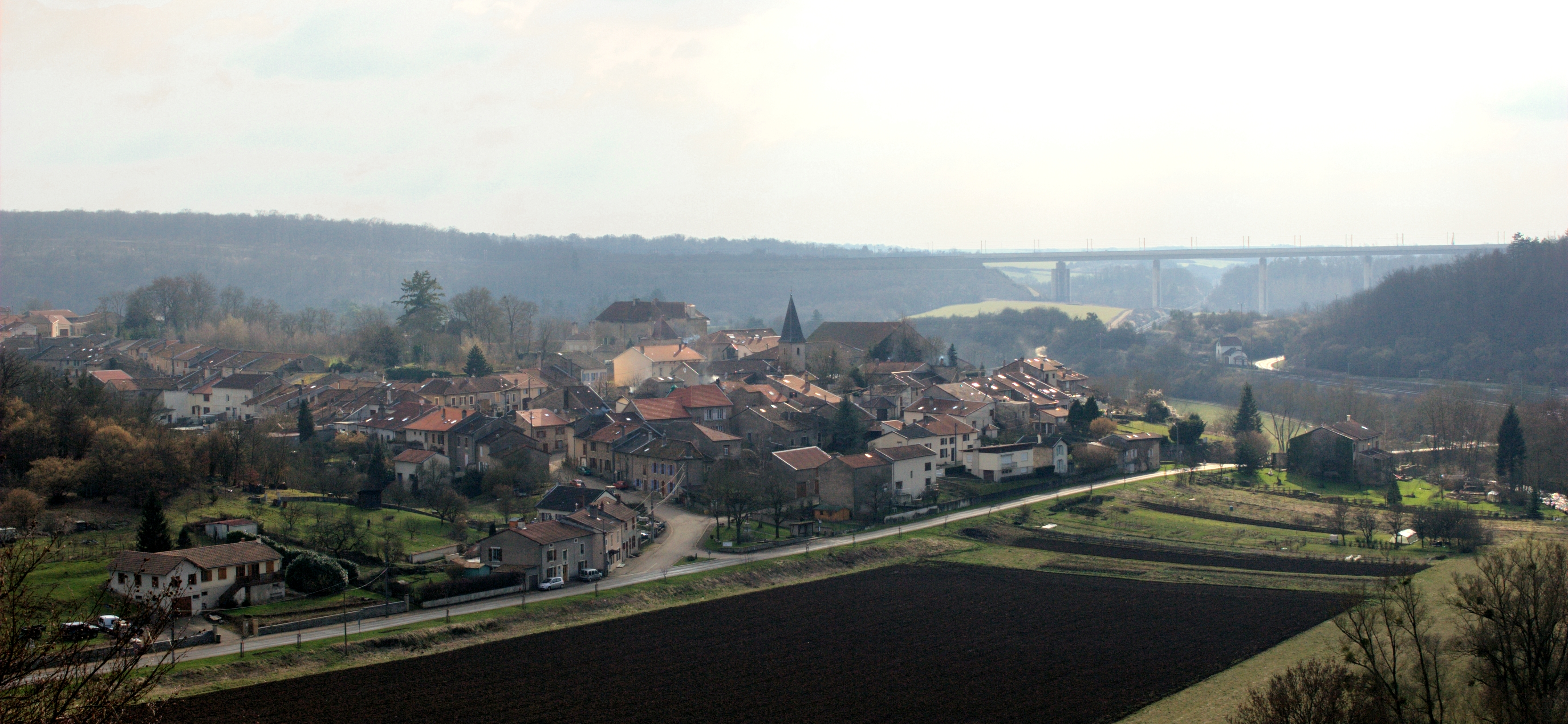 Panorama de Jaulny